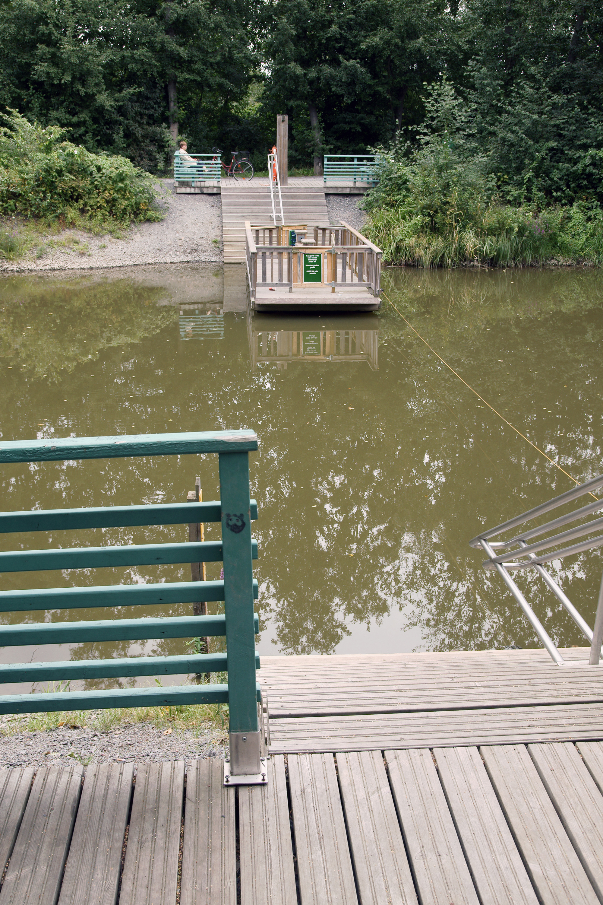 Polsanluodon lossi Porissa.